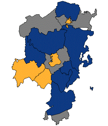 !Template:Llegenda}